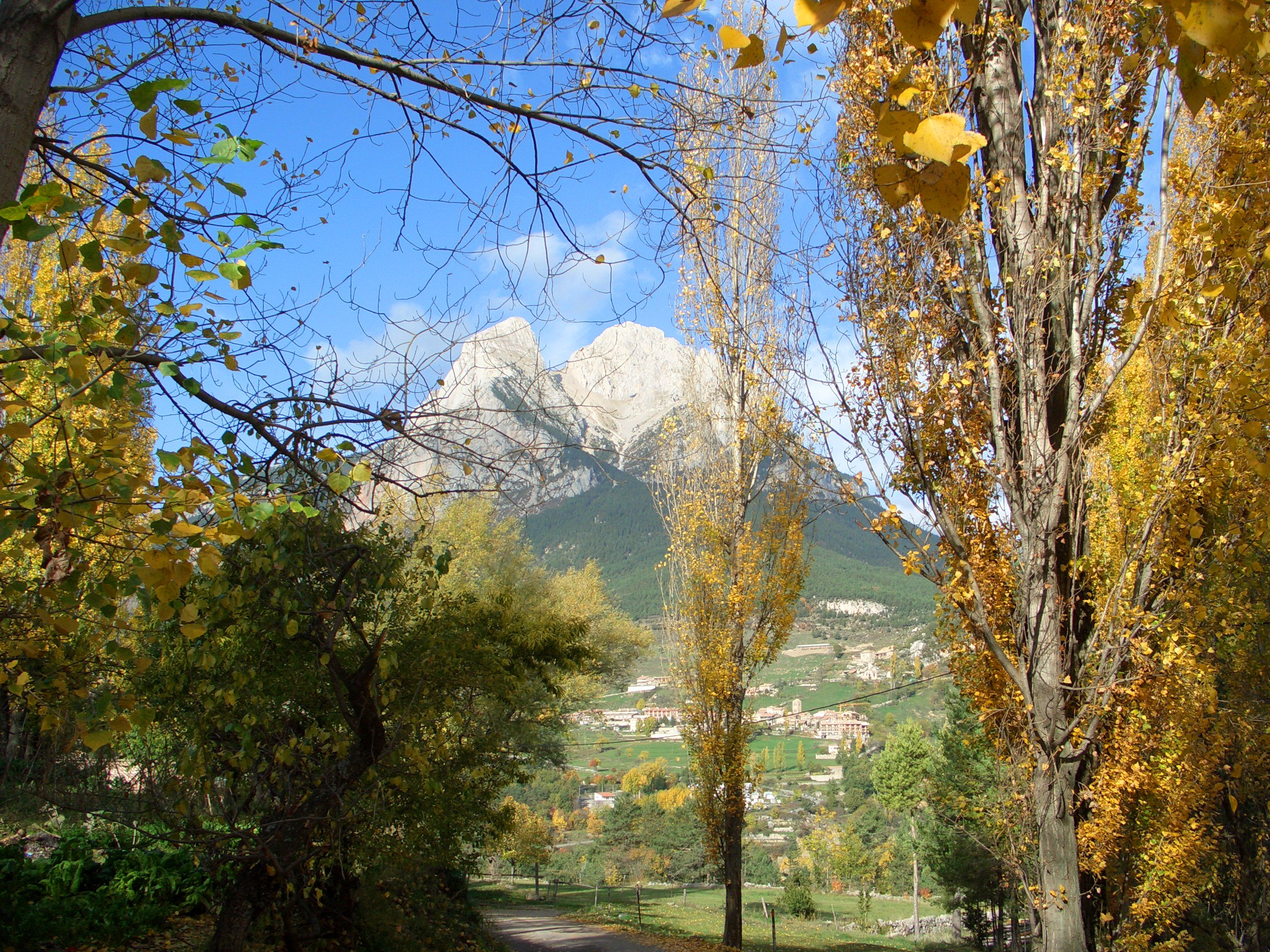 Pedraforca i Saldes enmig dels arbres